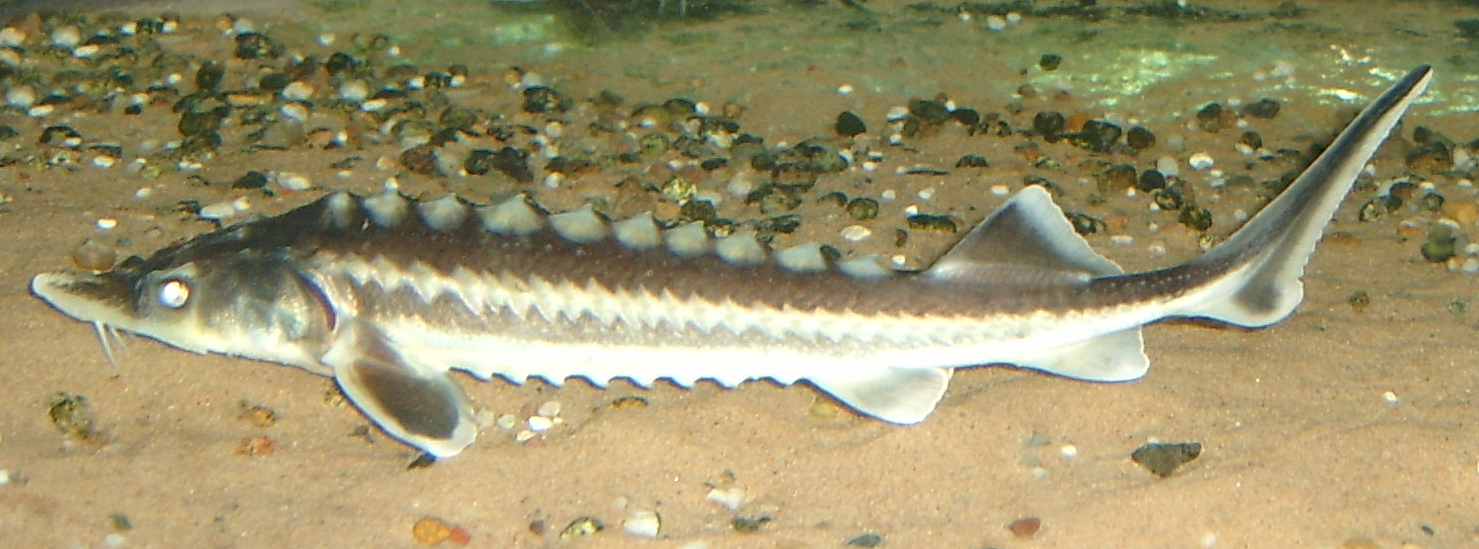 Russian sturgeon (Acipenser gueldenstaedtii Brandt & Ratzeburg)juv.